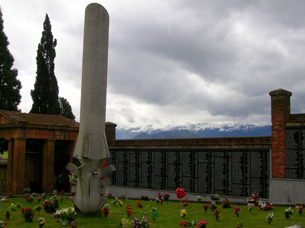 Monumento y fosa común del cementerio civil de Oviedo, Asturias (España)